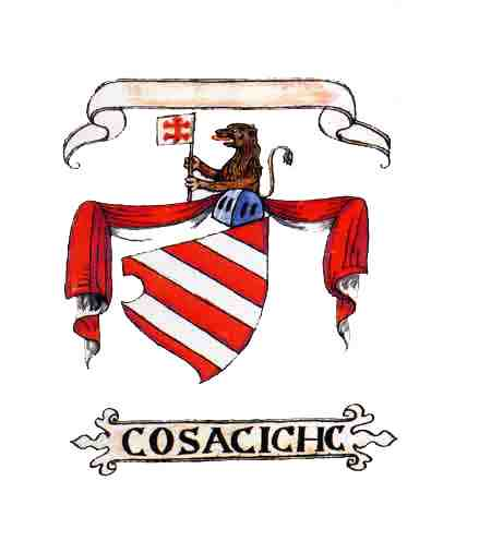 A Vukčić család címere az Illír címerkönyvbenHrvatski: Grb Kosača prema Fojničkom grbovniku